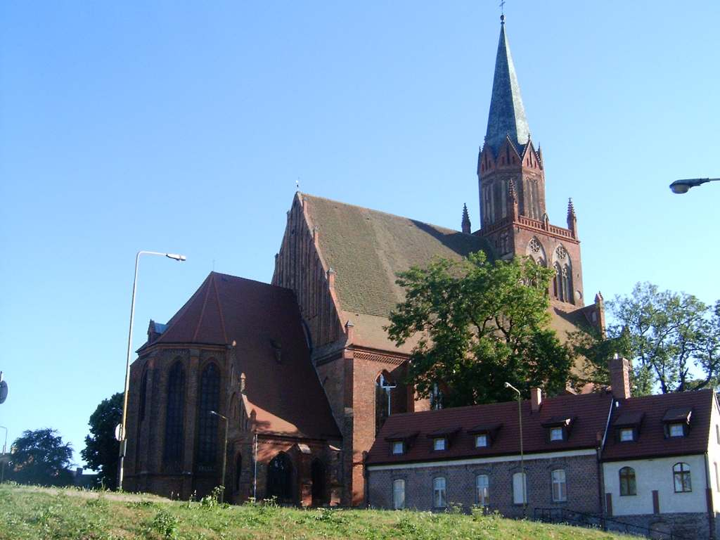 Kościół parafialny pw. Macierzyństwa Najświętszej Marii Panny w Trzebiatowie